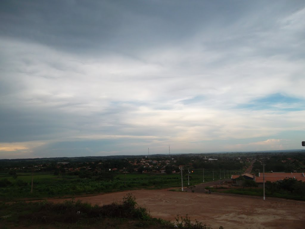 Pedro Gomes vista do alto da Vila Marcelino